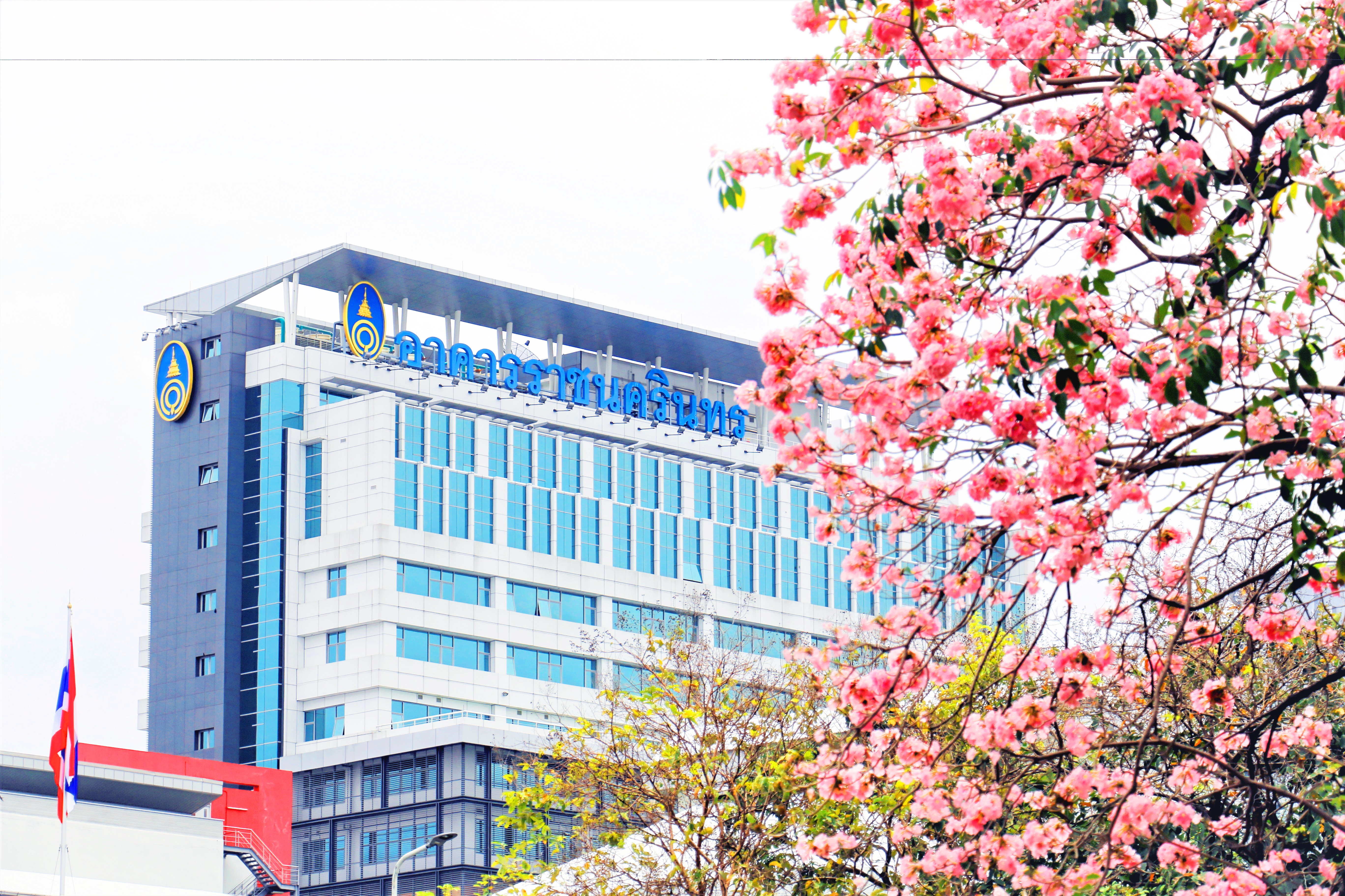 โรงพยาบาลเวชศาสตร์เขตร้อน